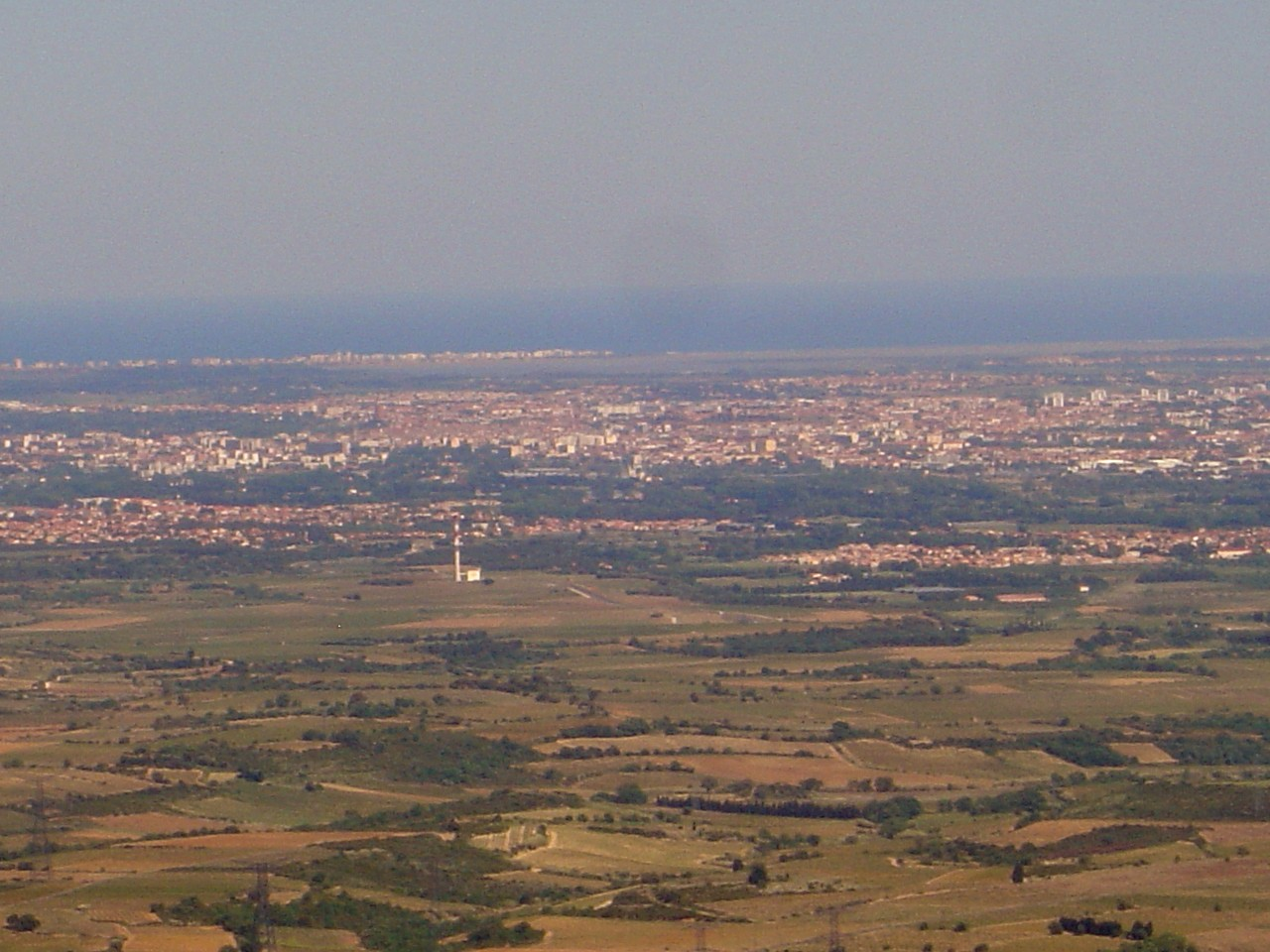 Perpignan depuis le Forca Real